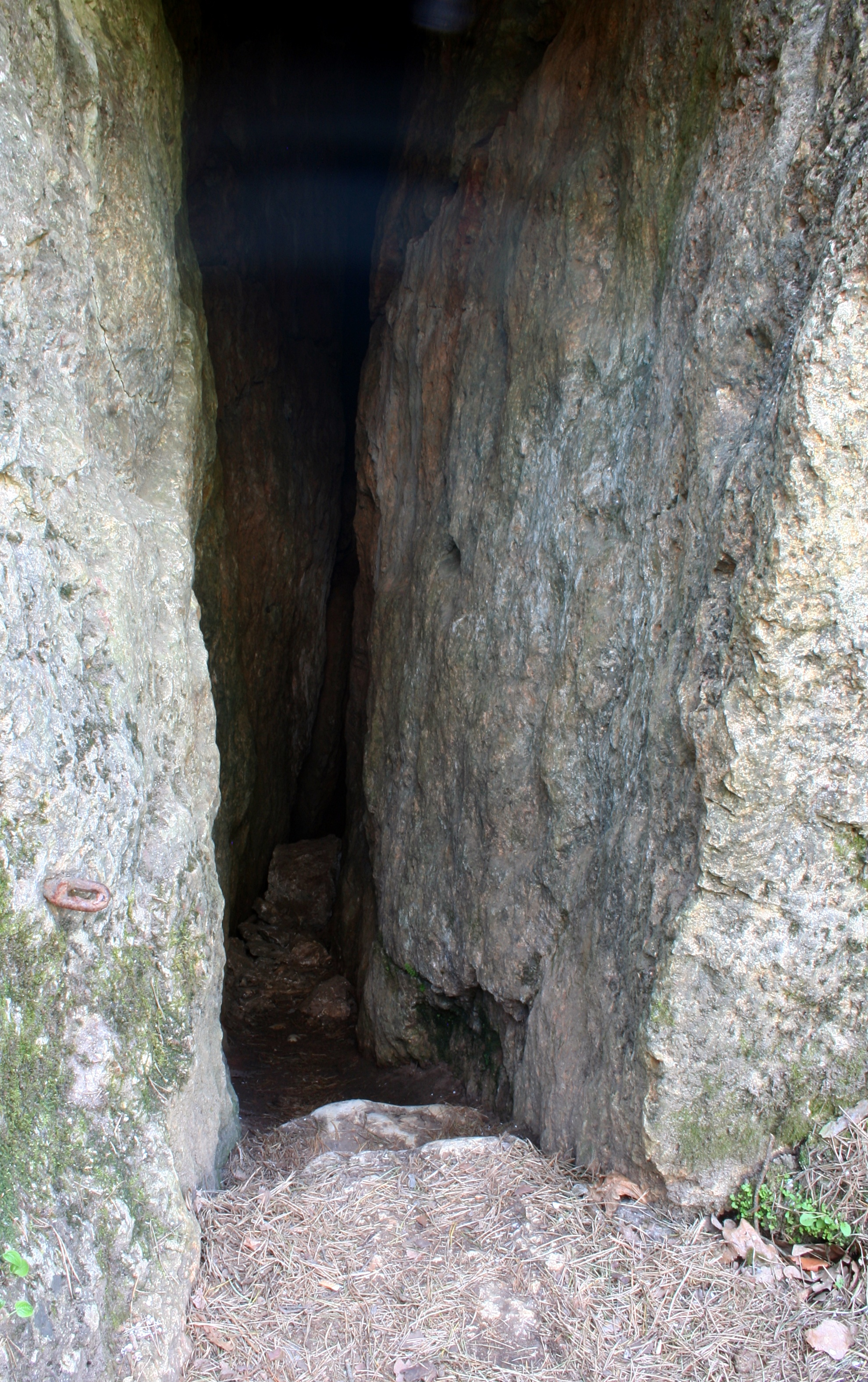 Załęczański PK, Rezerwat Węże, Jaskinia za Kratą na górze Zelce - wejście